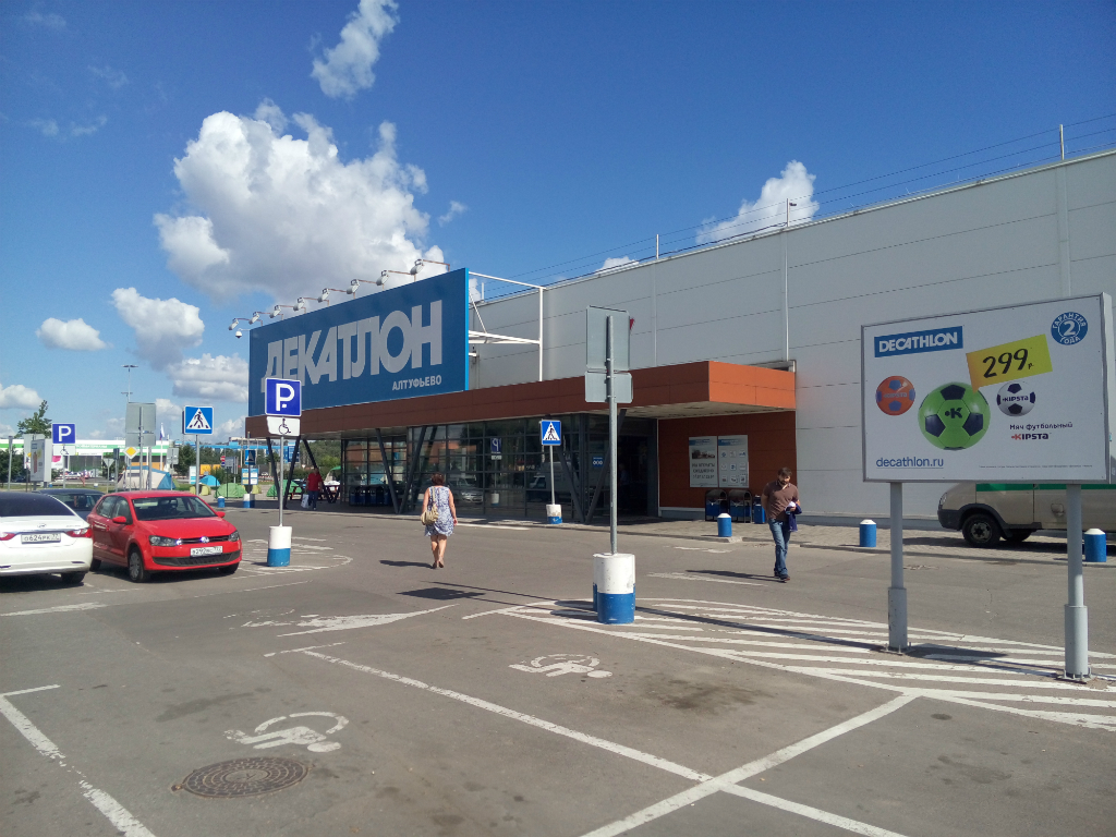 Магазин Декатлон в Алтуфьево